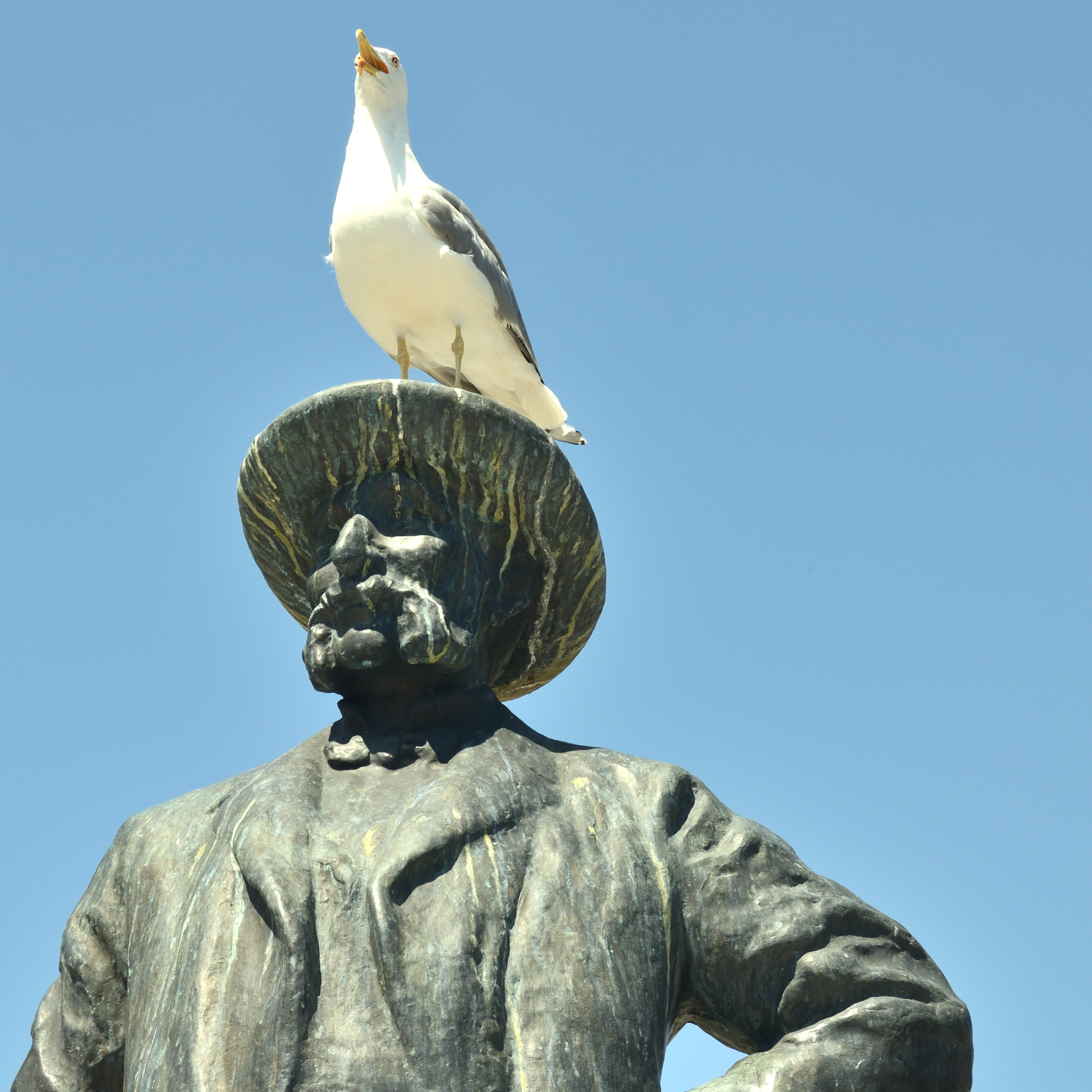 Ivan Zajc (c) photo: Leendert Wolters